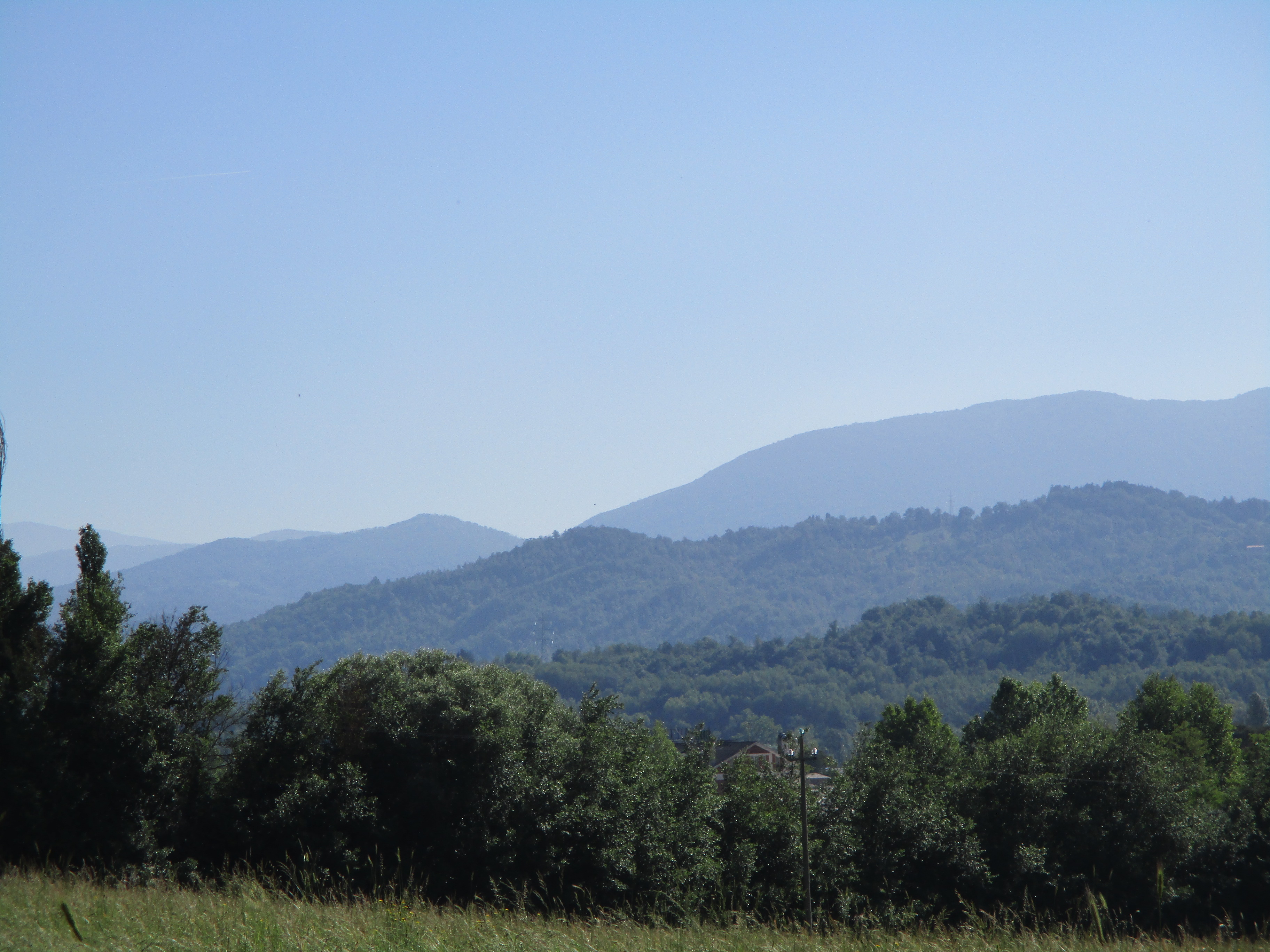 Veduta del bosco